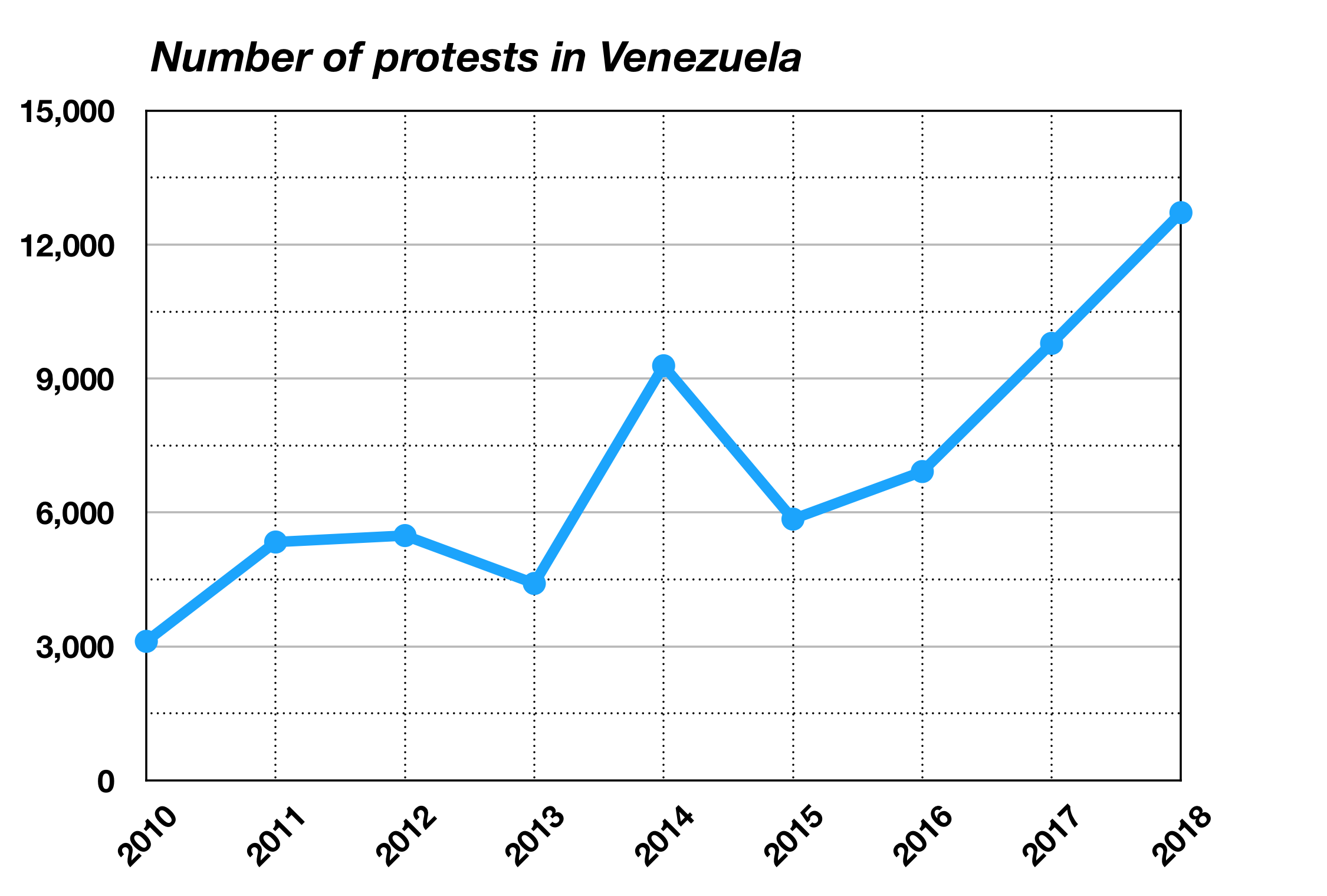 Gráfica de número de protestas en Venezuela, según el Observatorio Venezolano de Conflictividad Social